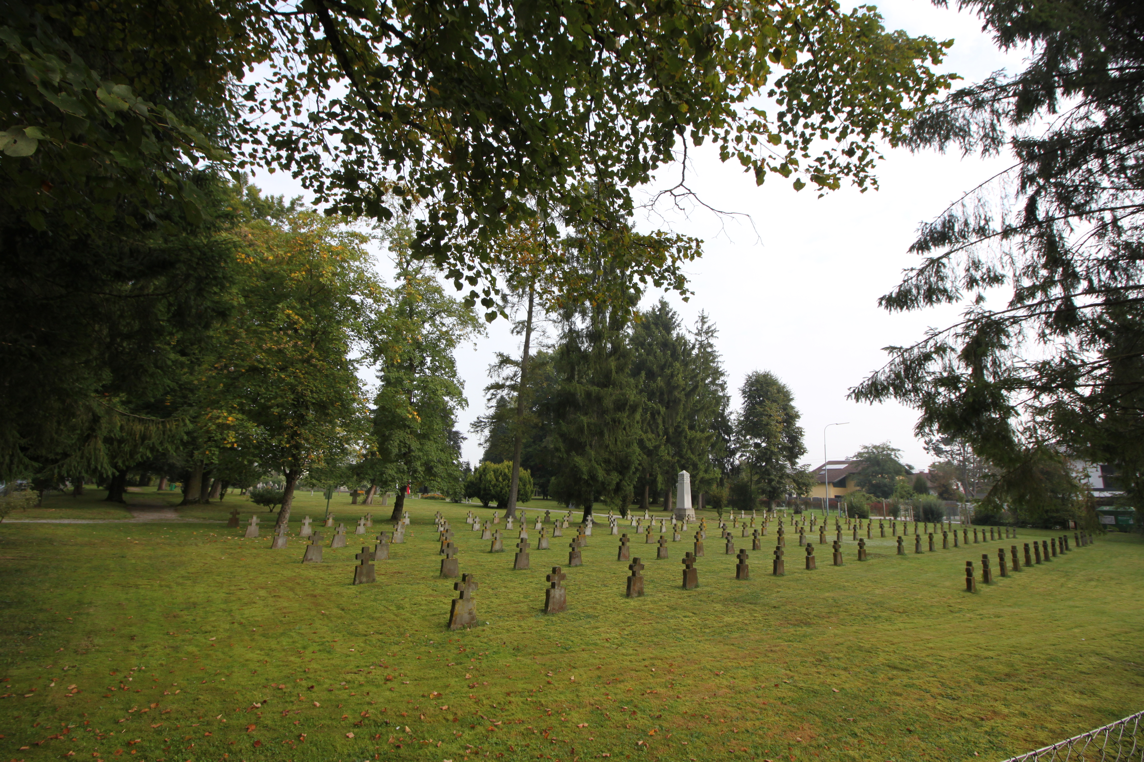 Soldatenfriedhof Braunau-Haselbach, italienische Gräber